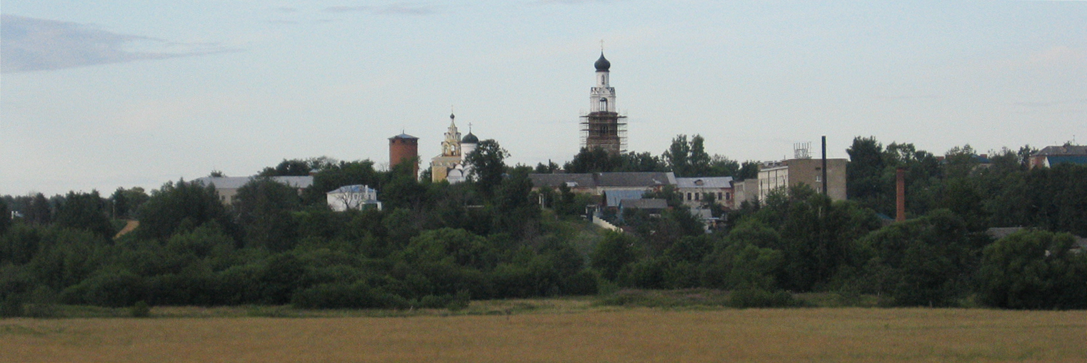 Киржач